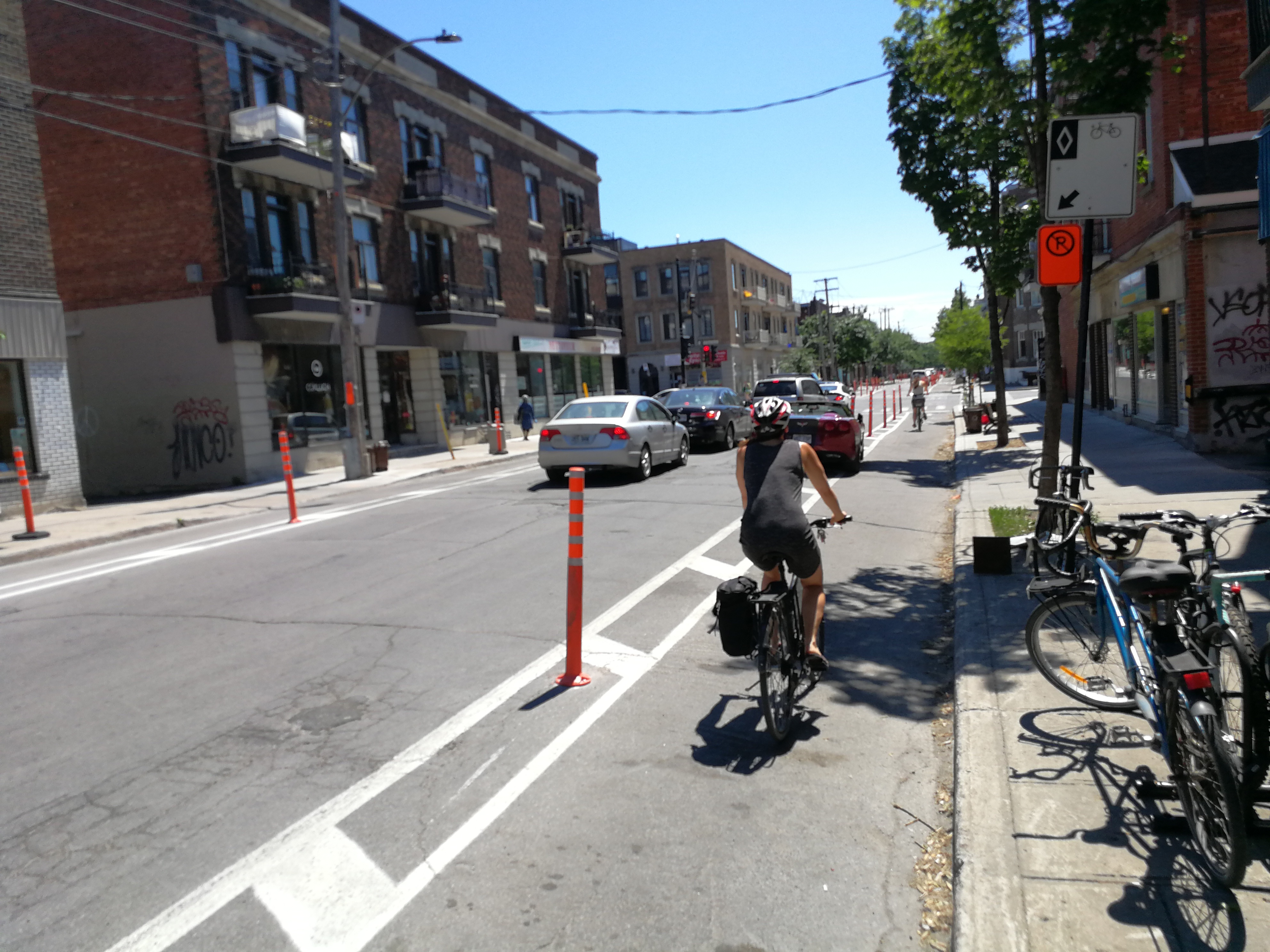 Voie active sécuritaire à Montréal sur la rue Villeray. On distingue deux bandes cyclables de part et d'autre de la rue, qui a elle-même été transformée en sens unique.